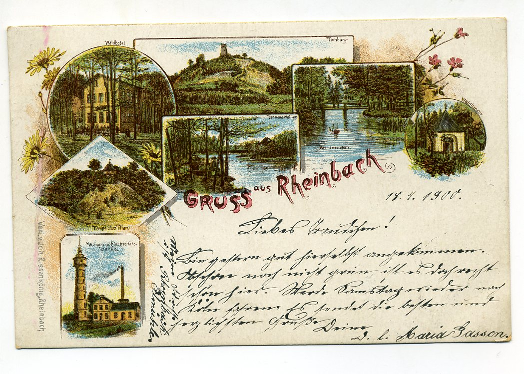 Gruss aus Rheinbach -1900 Waldhotel -Tomburg - Tempelchen Diana - Wasser u.Electricitäts-Werke - Der neue Weiher -das Inselchen -Waldkapelle